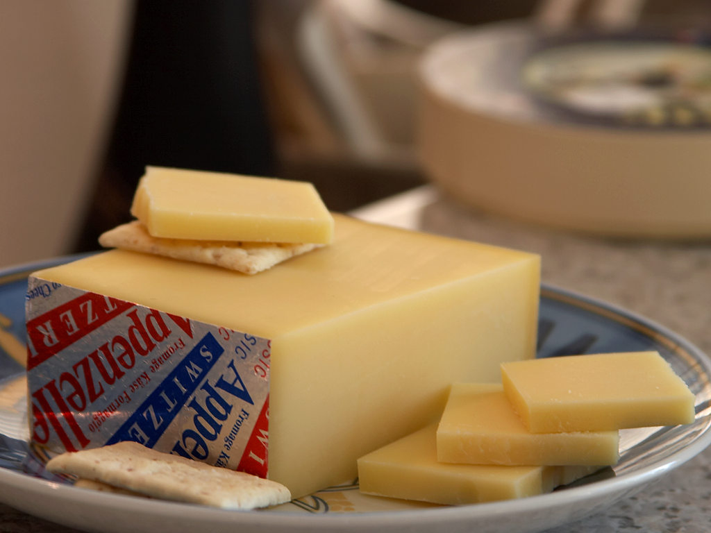 Appenzeller Käse (Appenzeller Classic, MILD-WÜRZIG), Käse aus der Ostschweiz